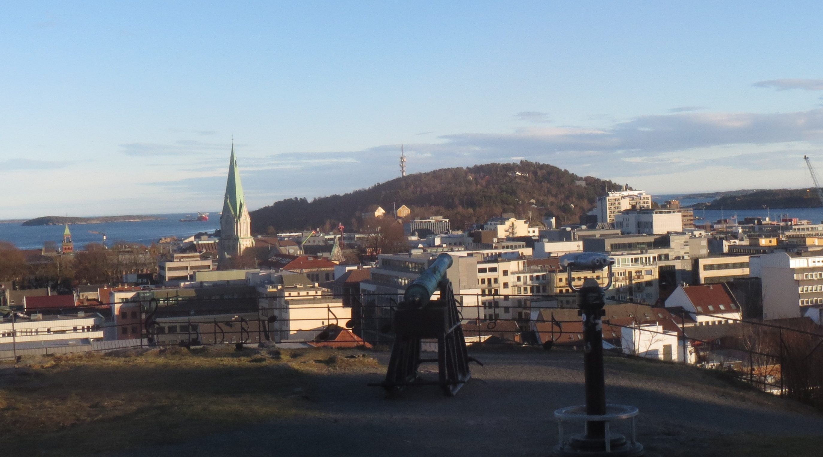 Brannvarslingskanon på Drageknatten, utsikt over Kvadraturen